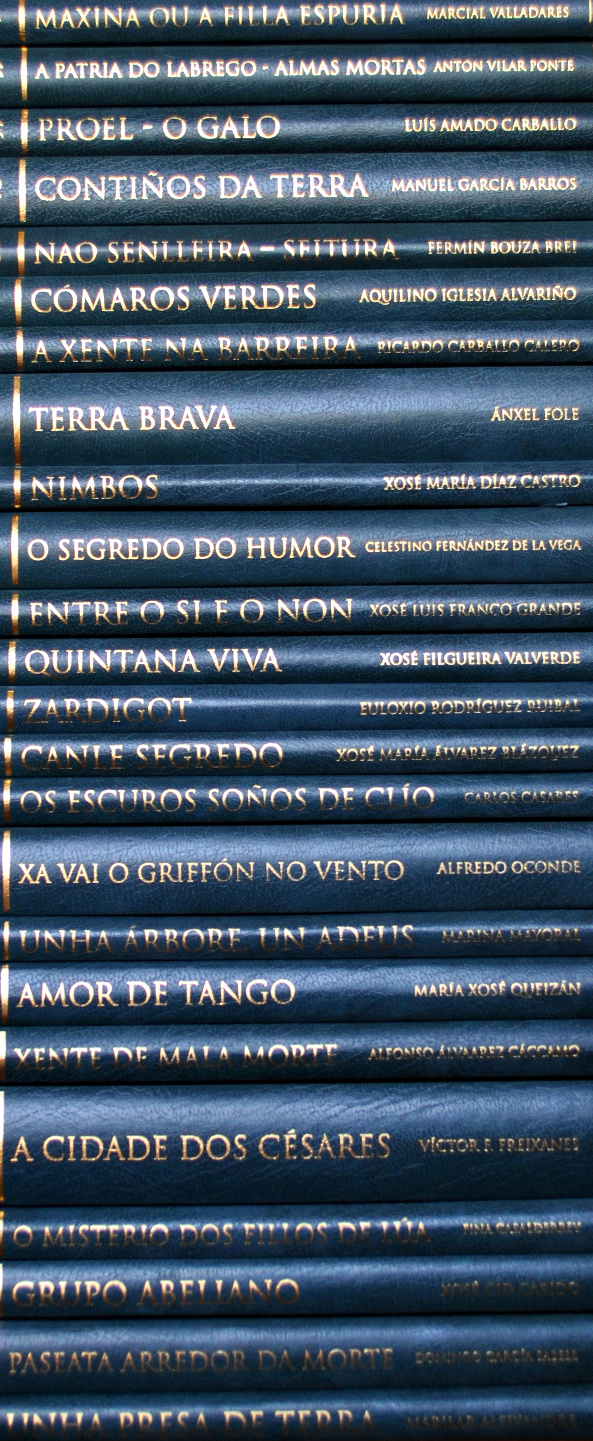 Lombos dalgúns dos libros da Biblioteca Galega 120.